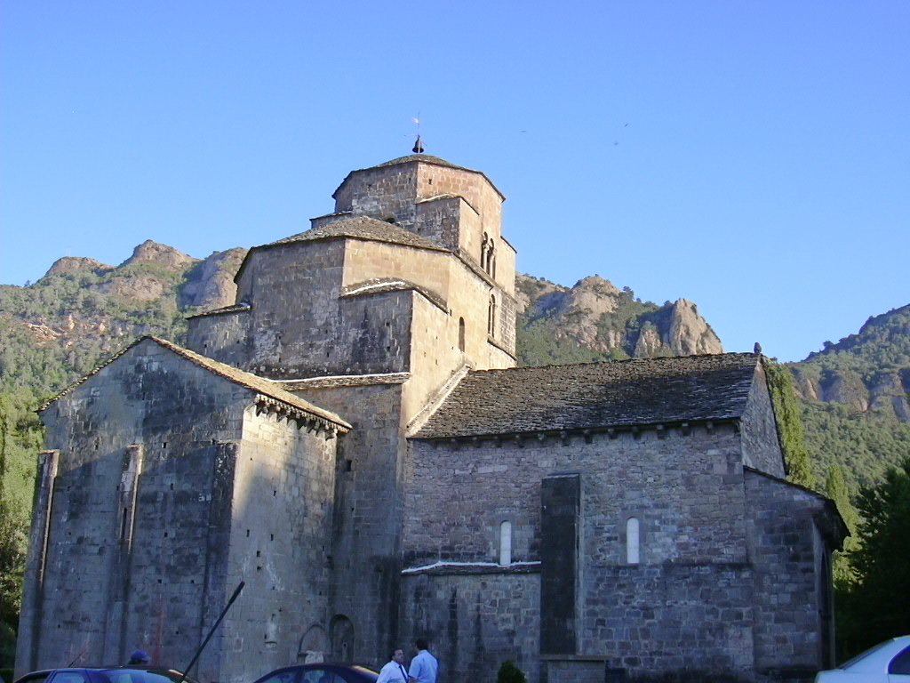 Vista de la Iglesia de Santa María en Santa Cruz de la Serós - Siglos XI y XII